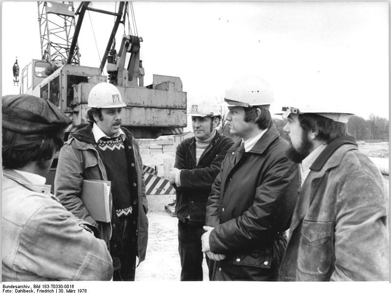 ADN-ZB Gahlbeck-30.3.78-Schö Leipzig Eine umfangreiche Massenkontrolle zur Verbesserung der Materialökonomie in den Leipziger Baubetrieben begannen in diesen Tagen. Mitglieder der Arbeiter- und-Bauern-Inspektion. Siegfried Engelke (2.v.r.) von der Bezirksinspektion der ABI informierte sich auf der zweitgrößten Wohnungsbaustelle der Republik, Leipzig-Grünau, beim Brigadier Peter Dietrich (Mitte) über die Einsparung von 380 Tonnen Zement und 70 Tonnen Stahl durch ein neuartiges Verfahren des Sammelkanalbaus.